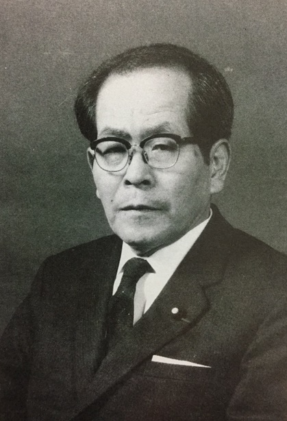 大上司追悼集より